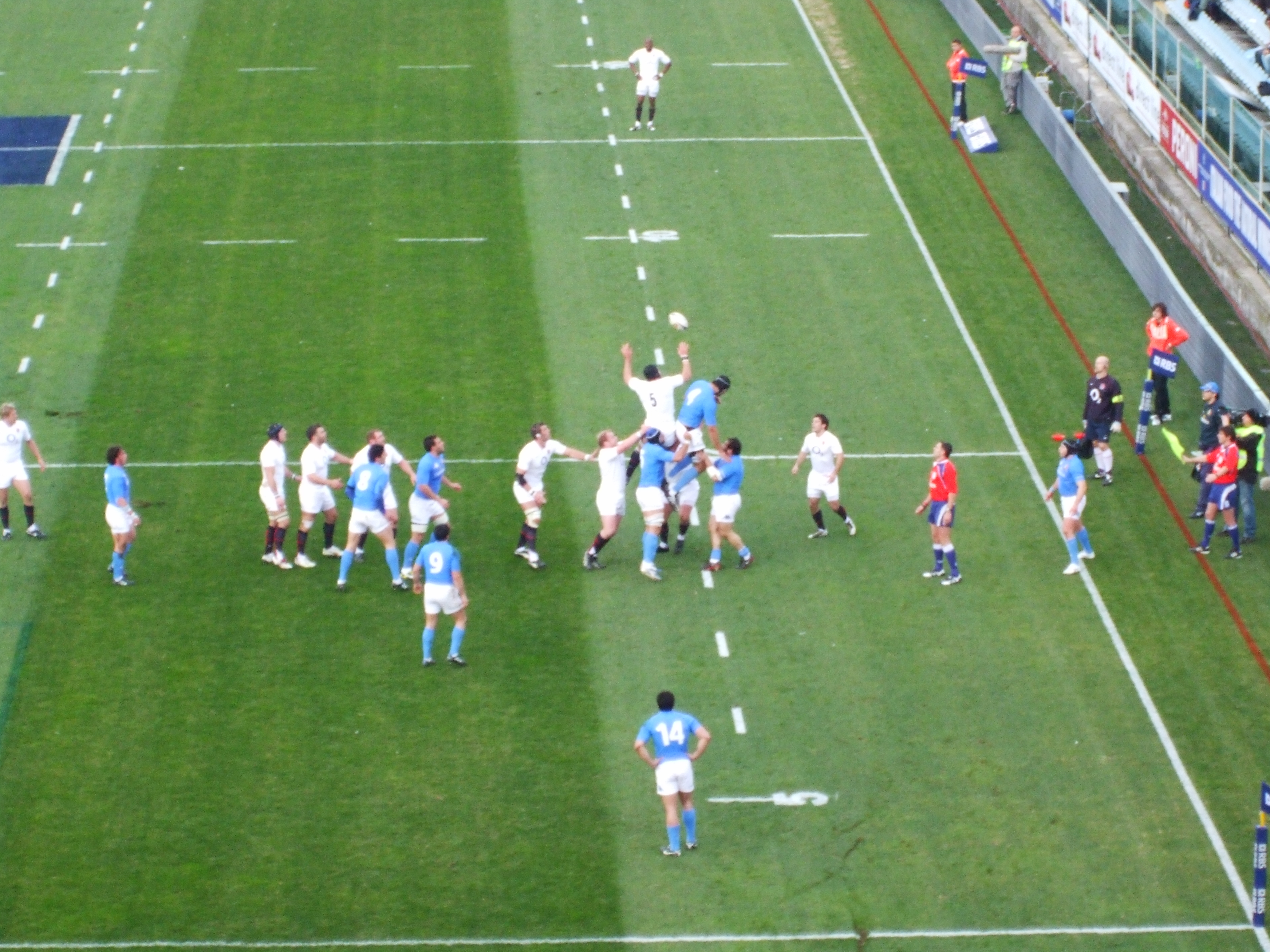 azione di gioco durante il match del 6 Nazioni 2010 tra Italia e Inghilterra, Stadio Flaminio, Roma